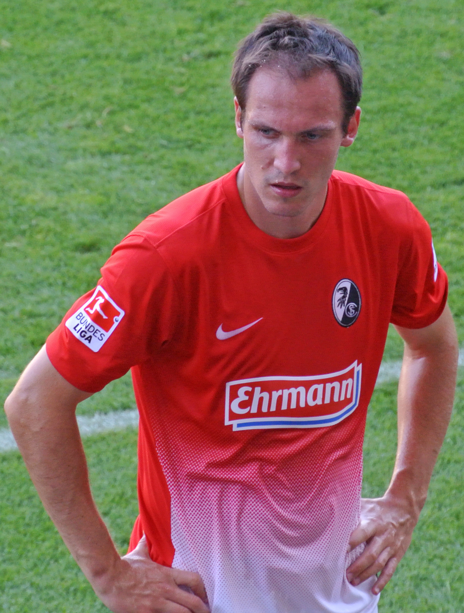 Sebastian Freis nach dem Saisoneröffnungsspiel des SC Freiburg gegen Athletico Bilbao am 27. Juli 2013